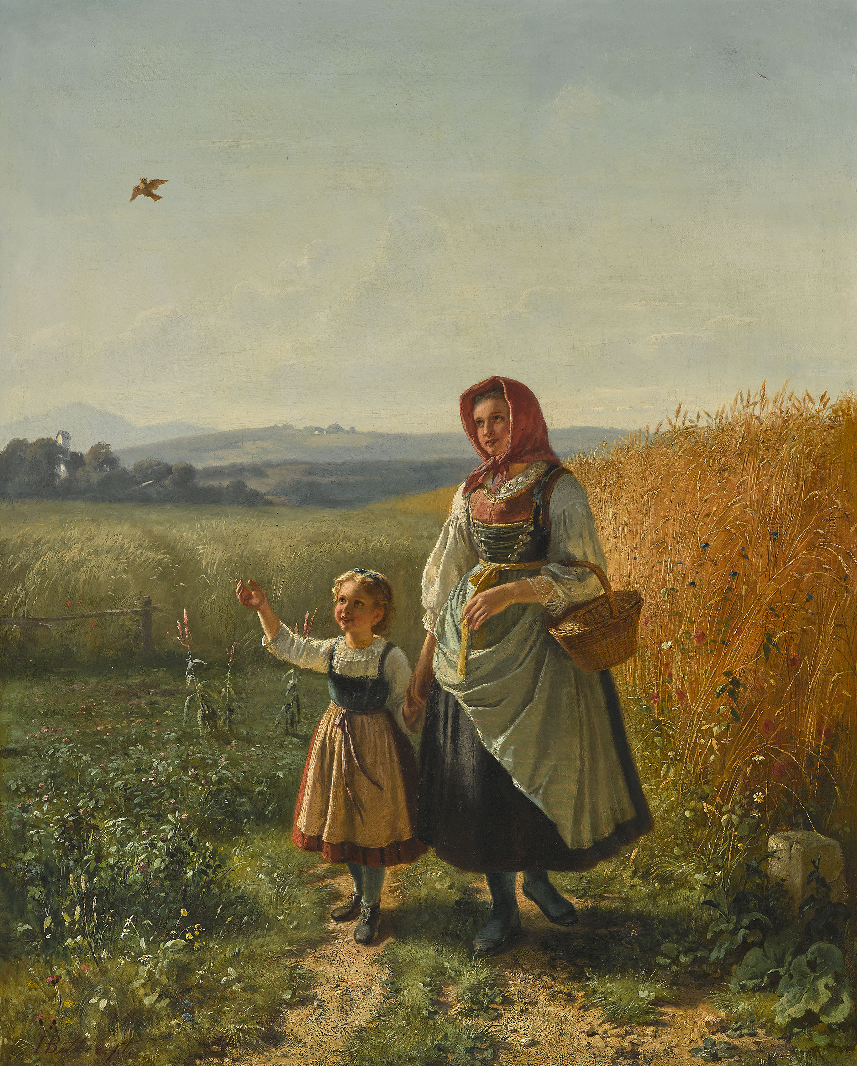 Ein Sommerspaziergang - Junge Bäuerin mit ihrer Tochter auf dem Feldweg. Beide schauen einer aufsteigenden Lerche nach